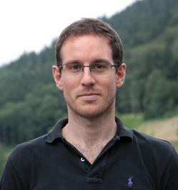 Foto di Alessio Figalli